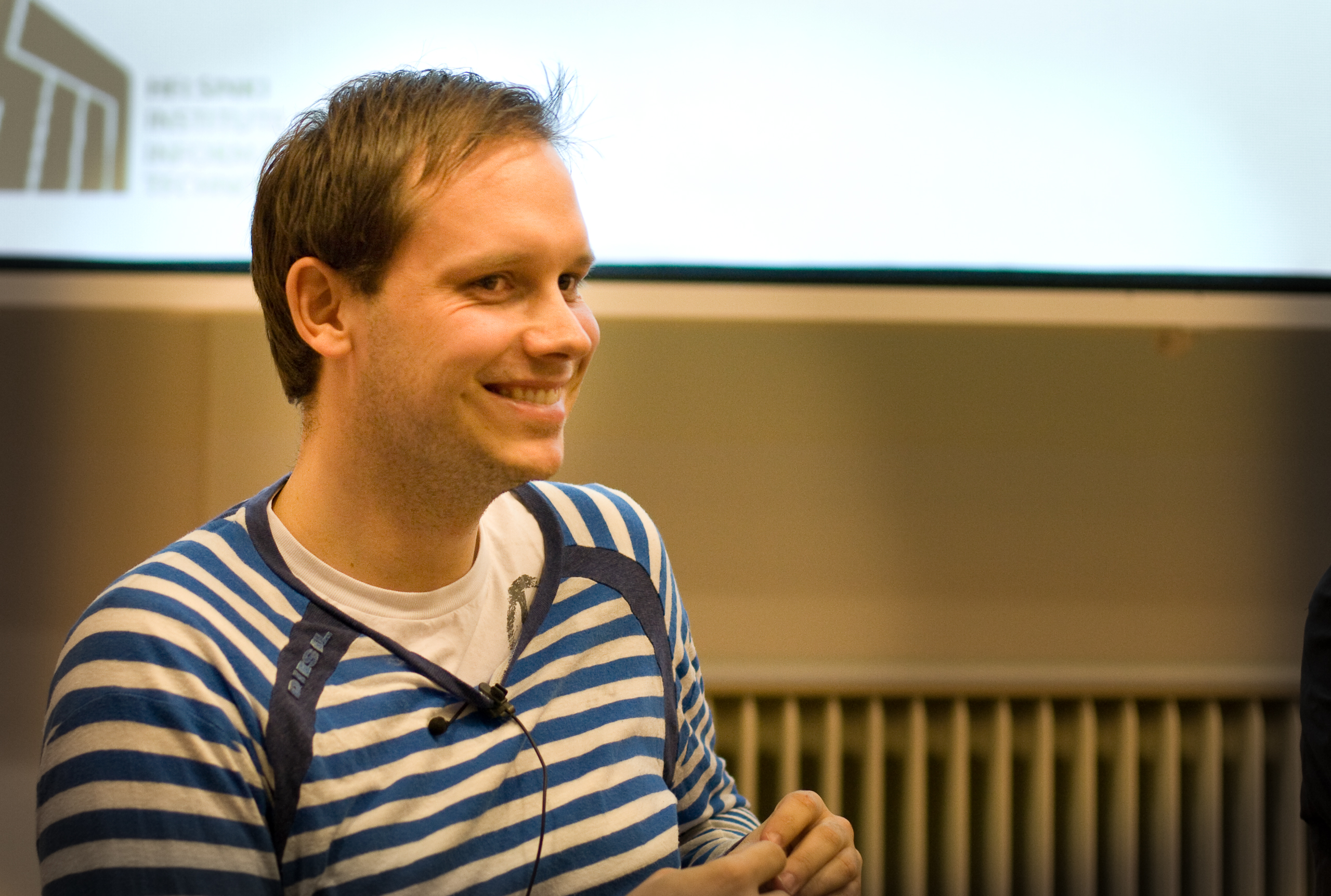 Peter Sunde, The Pirate Bay-frontfigur.